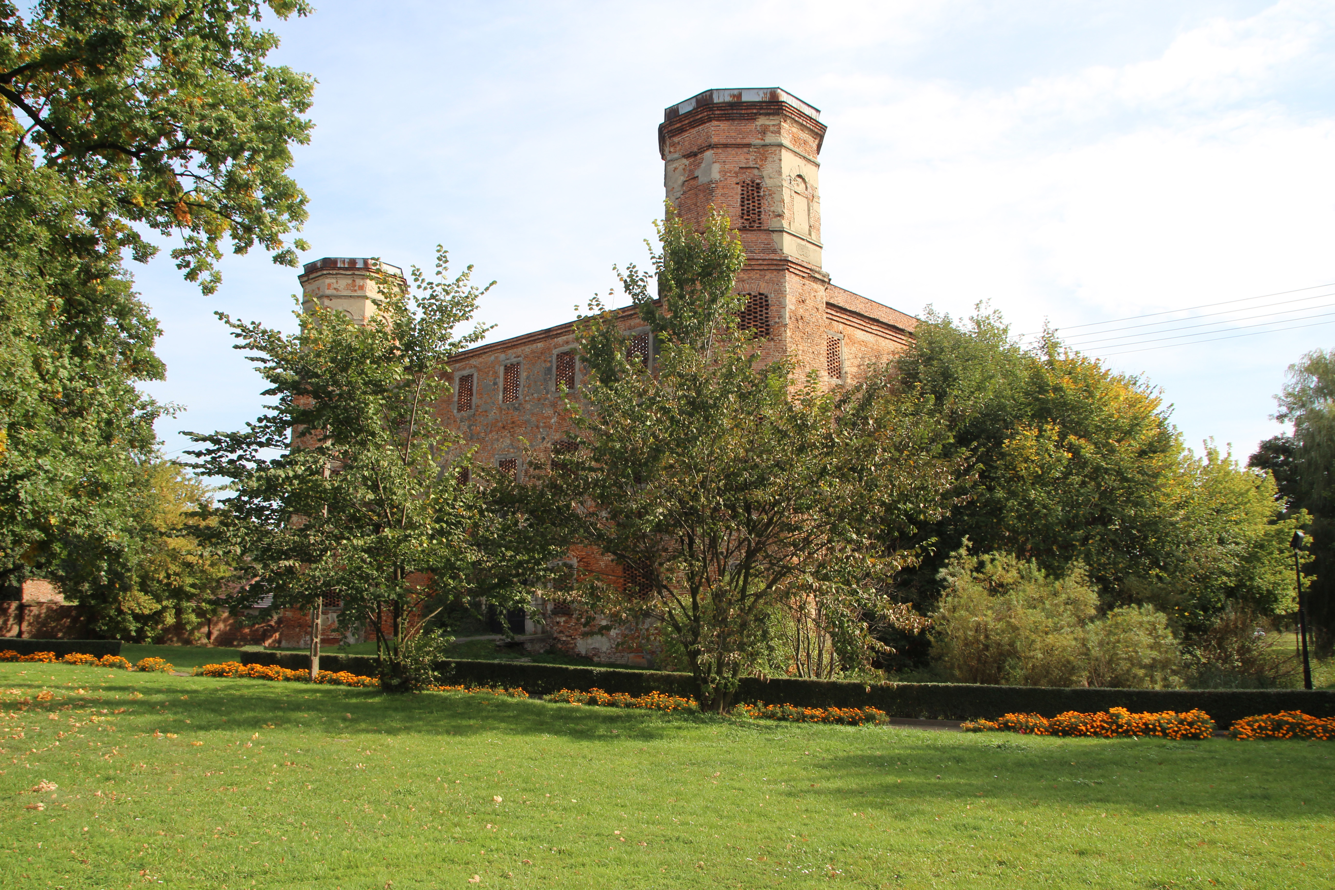 Polska Cerekiew (w j. niem. Groß Neukirch) – wieś w Polsce położona w województwie opolskim, w powiecie kędzierzyńsko-kozielskim, w gminie Polska Cerekiew.